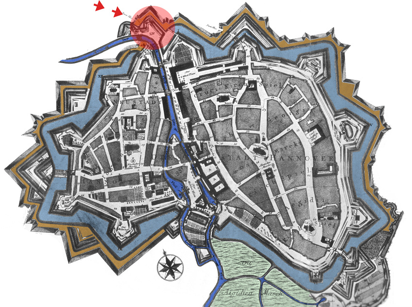 Clevertor Karte Hannover